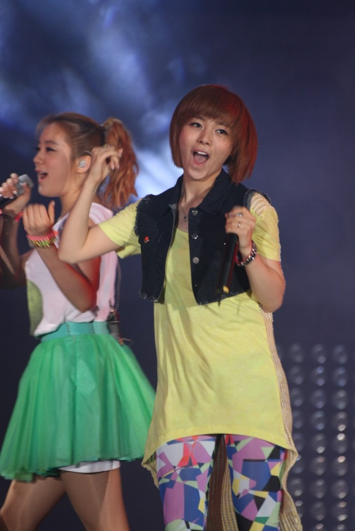 원더걸스 선예